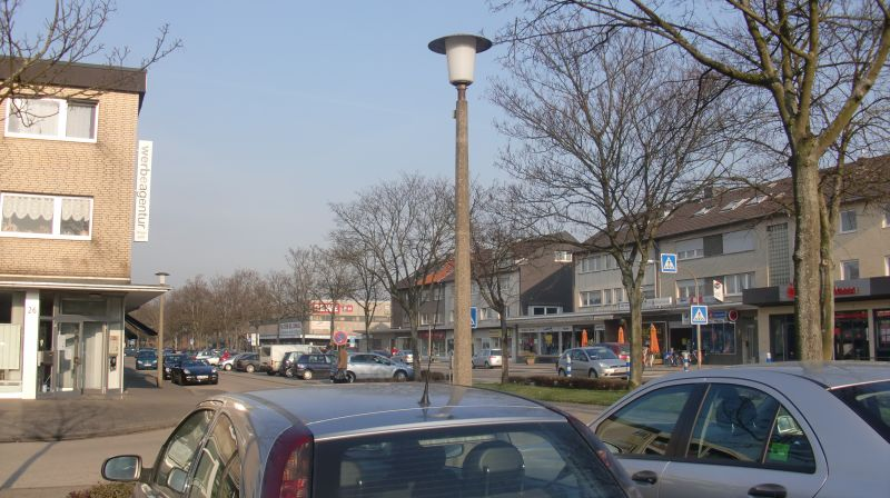 Die St. Rochusstraße in Morken-Harff (neu)